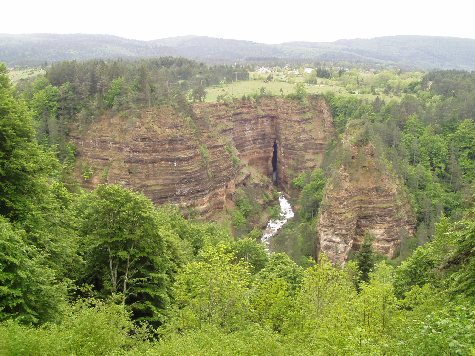 L'abîme de Bramabiau en mai 2008 vu du panorama en face avec la rivière le Bonheur très visible car en hautes eaux